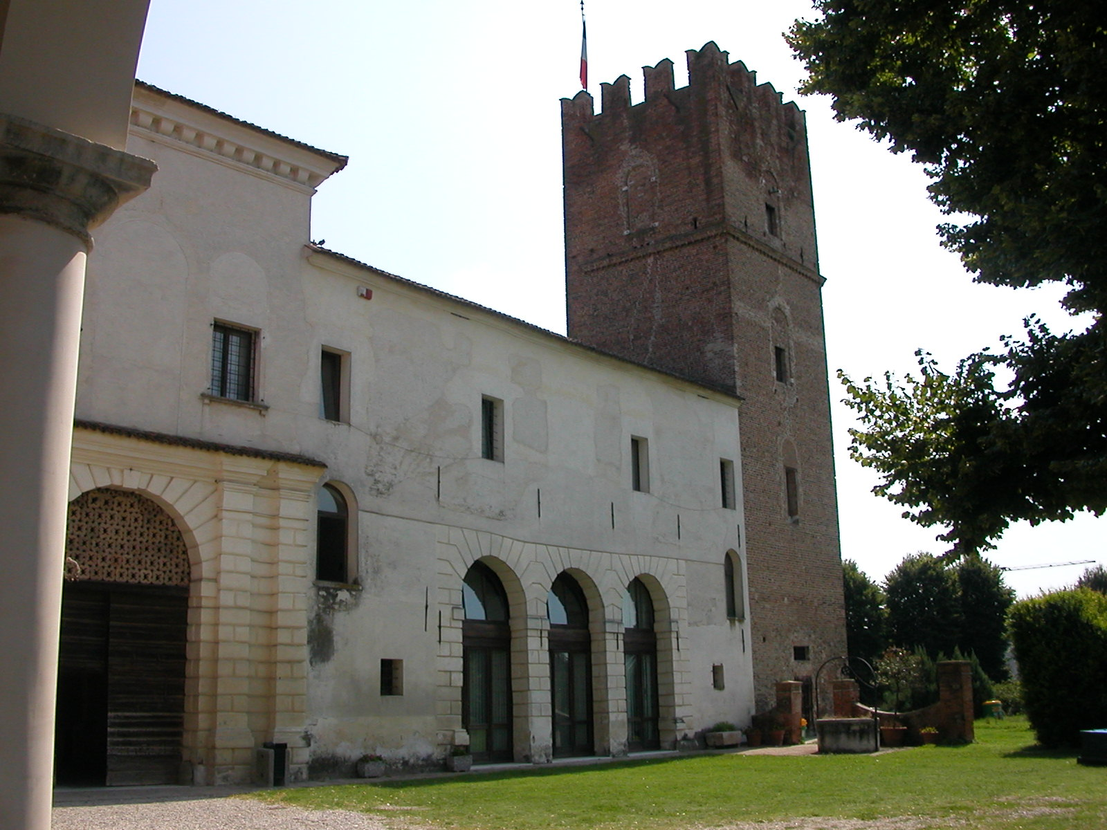 Castello Estense, Arquà Polesine, cortile interno con vista sulla torre.